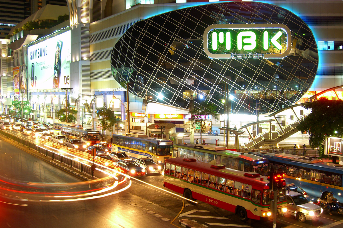 Mahboonkrong, alias MBK, l'un des plus grands Department Stores de Bangkok. Photographie par Christophe COAT